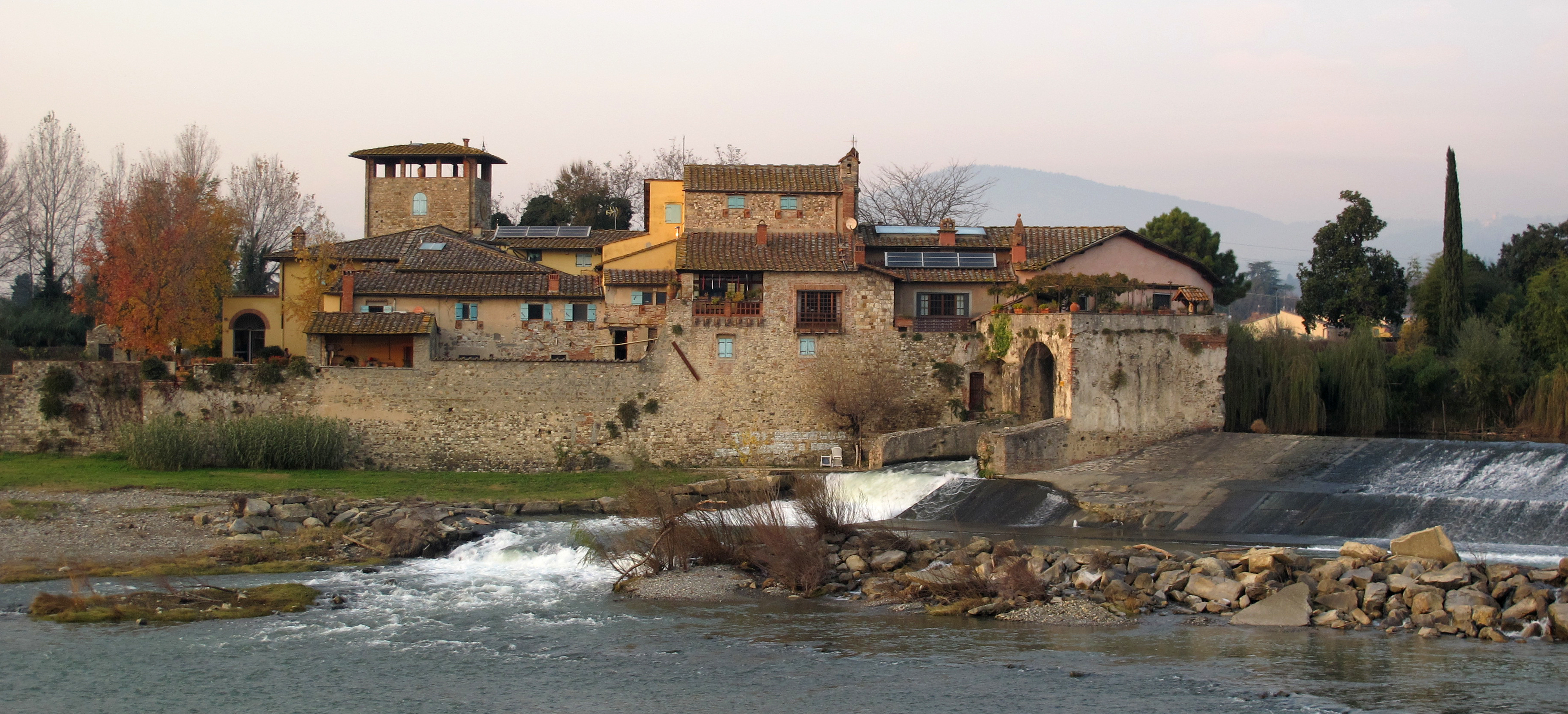 Firenze, vari siti